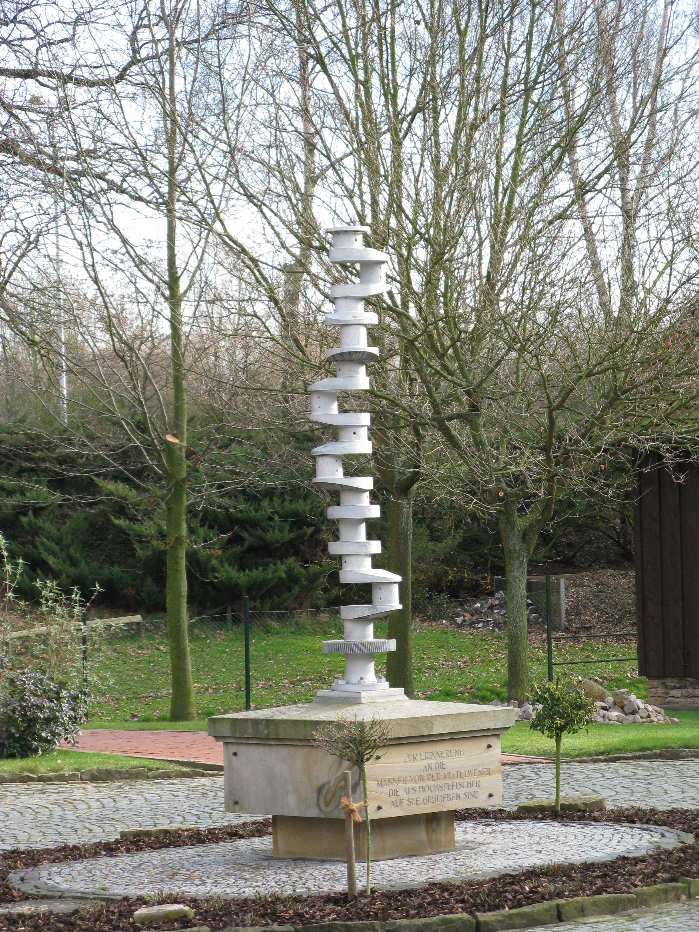 Kurbelwellen-Stele im Heringsfängermuseum Heimsen – „Zur Erinnerung an die Männer von der Mittelwesen, die als Hochseefischer auf See geblieben sind“